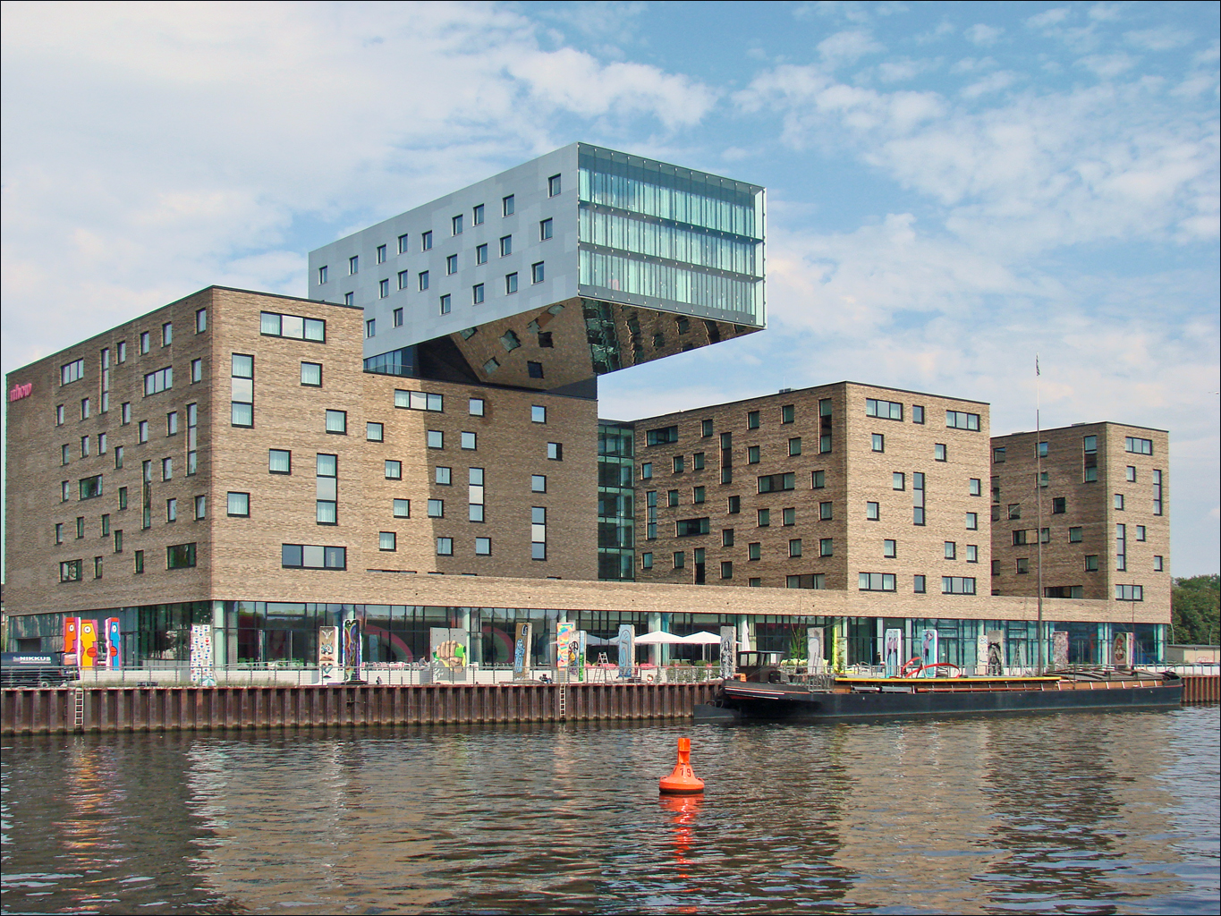 Ouvert fin 2010, le Nhow Hotel est un nouveau concept d'hôtel qui intègre la musique à ses prestations, mais également des studios d'enregistrement. Ce quartier de Berlin regroupe des salles de spectacles, des entreprises culturelles et des sociétés de production.